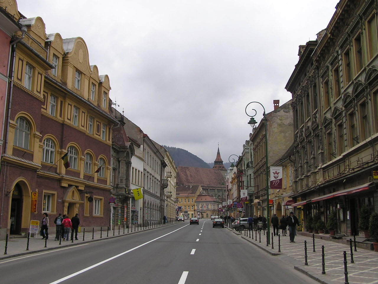 Die Strada Mureşenilor in Richtung Schwarze Kirche in Brașov, Rumänien